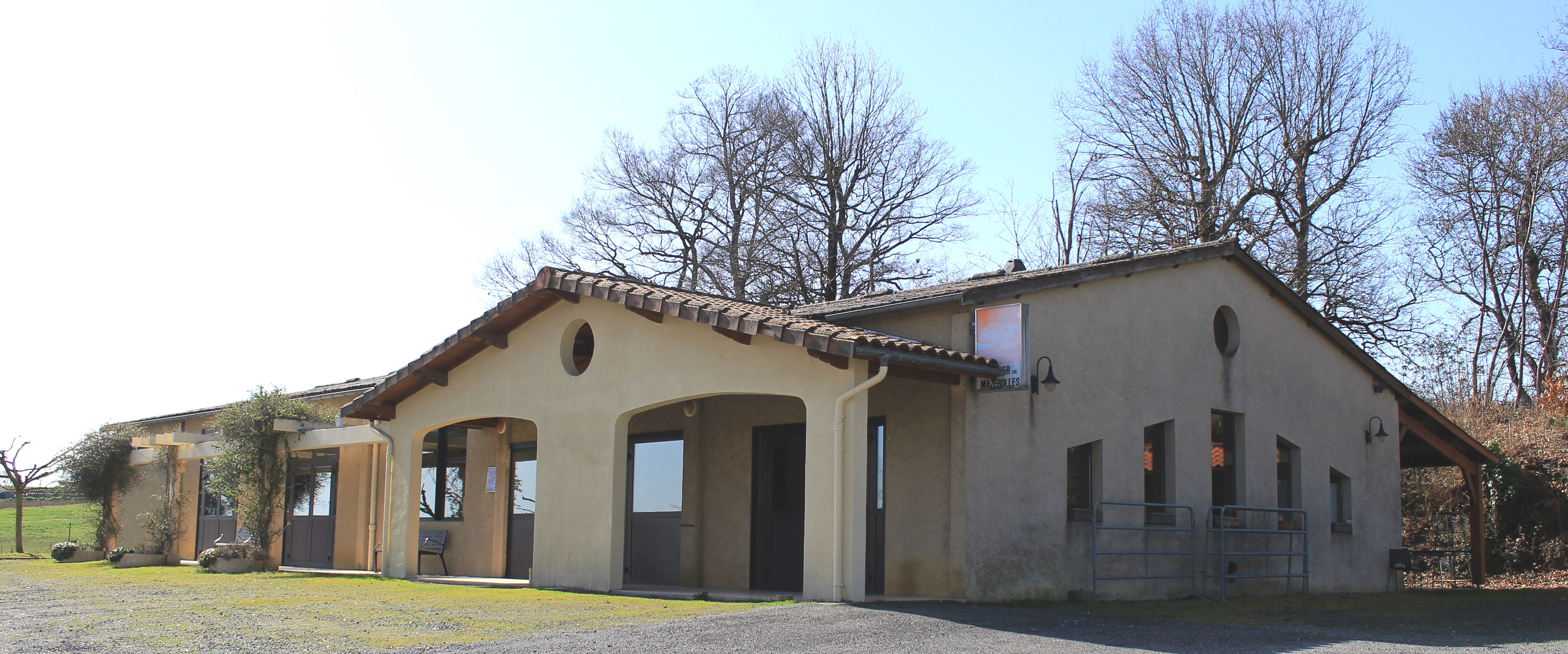 Salle des fêtes de Mazerolles (Hautes-Pyrénées)